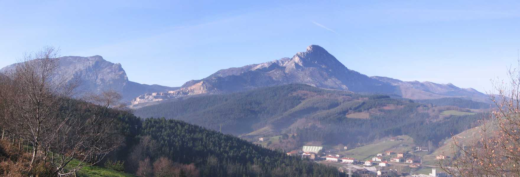 Vista del monte Mugarra, Vizcaya, País Vasco, España.